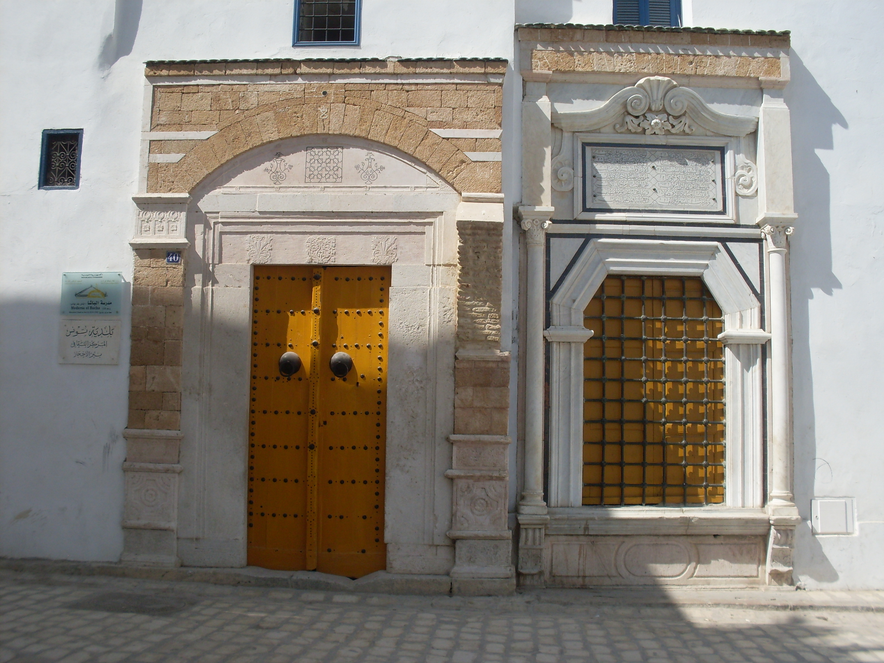 Medina de Tunis, Porte de Medersa Bir lahjar ou el Bacha